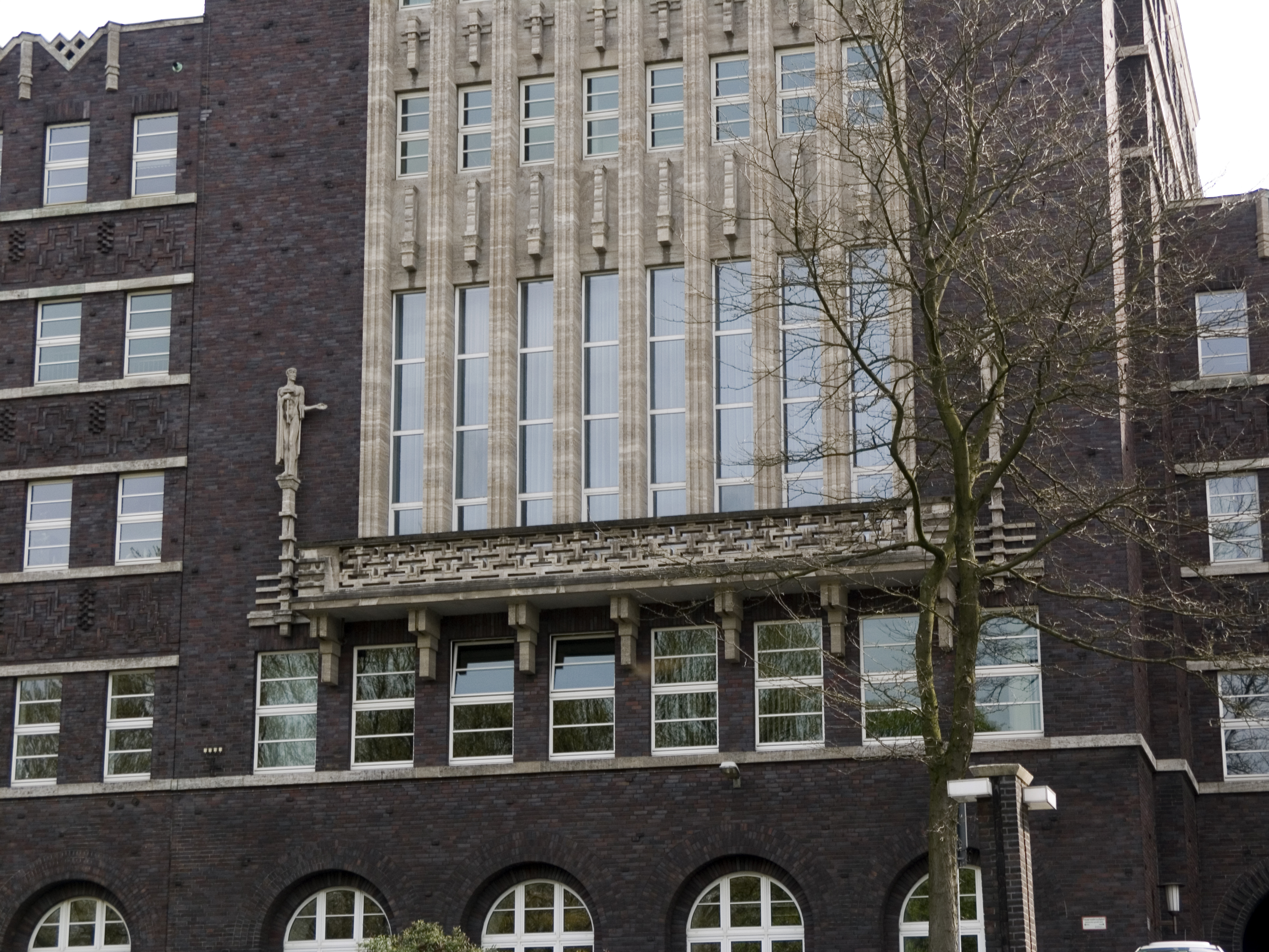 Северный Рейн - Вестфалия, Оберхаузен. Ратуша